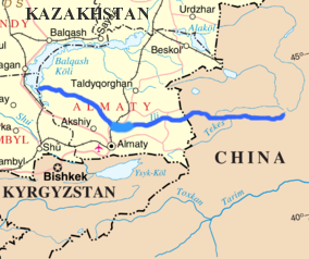 Information A= 描述摘要 B= 維基共享：Jeroen 所製的 Image:Un-kazakhstan.png C= 21/06/2008 D= 疾風狐狸 E= F= 檔案其他版本（可留空）